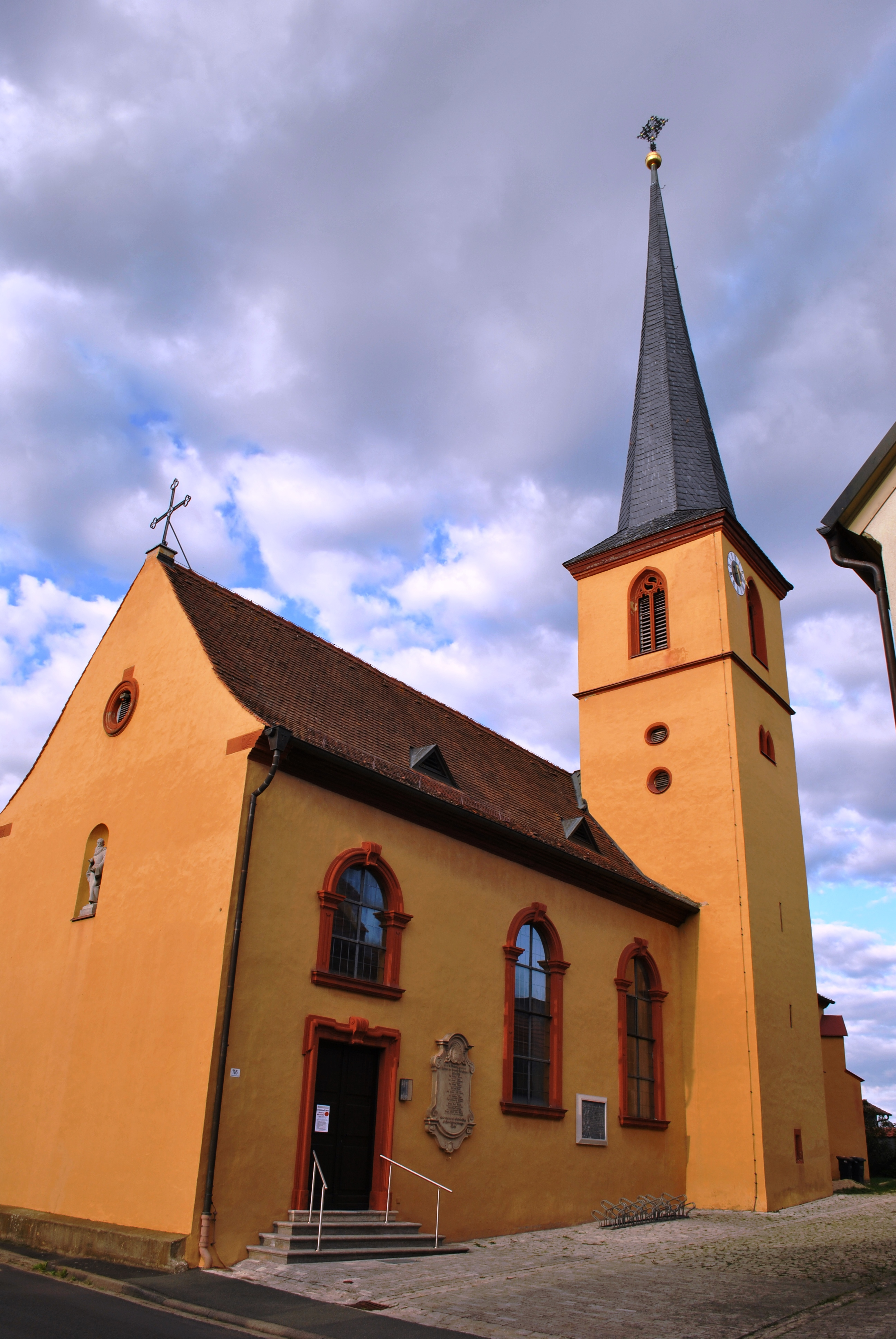 Katholische Filialkirche St. Ägidius Saalbau, Chor und Untergeschosse des Turmes erste Hälfte 15. Jahrhundert, Langhaus 1751; mit AusstattungThis is a photograph of an architectural monument.